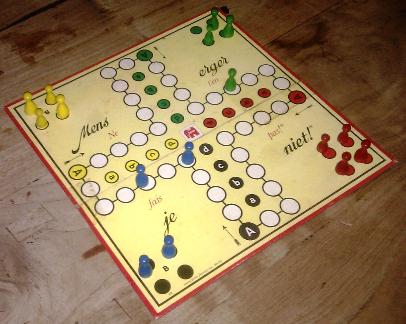 Nedersaksies: Mens erger je niet